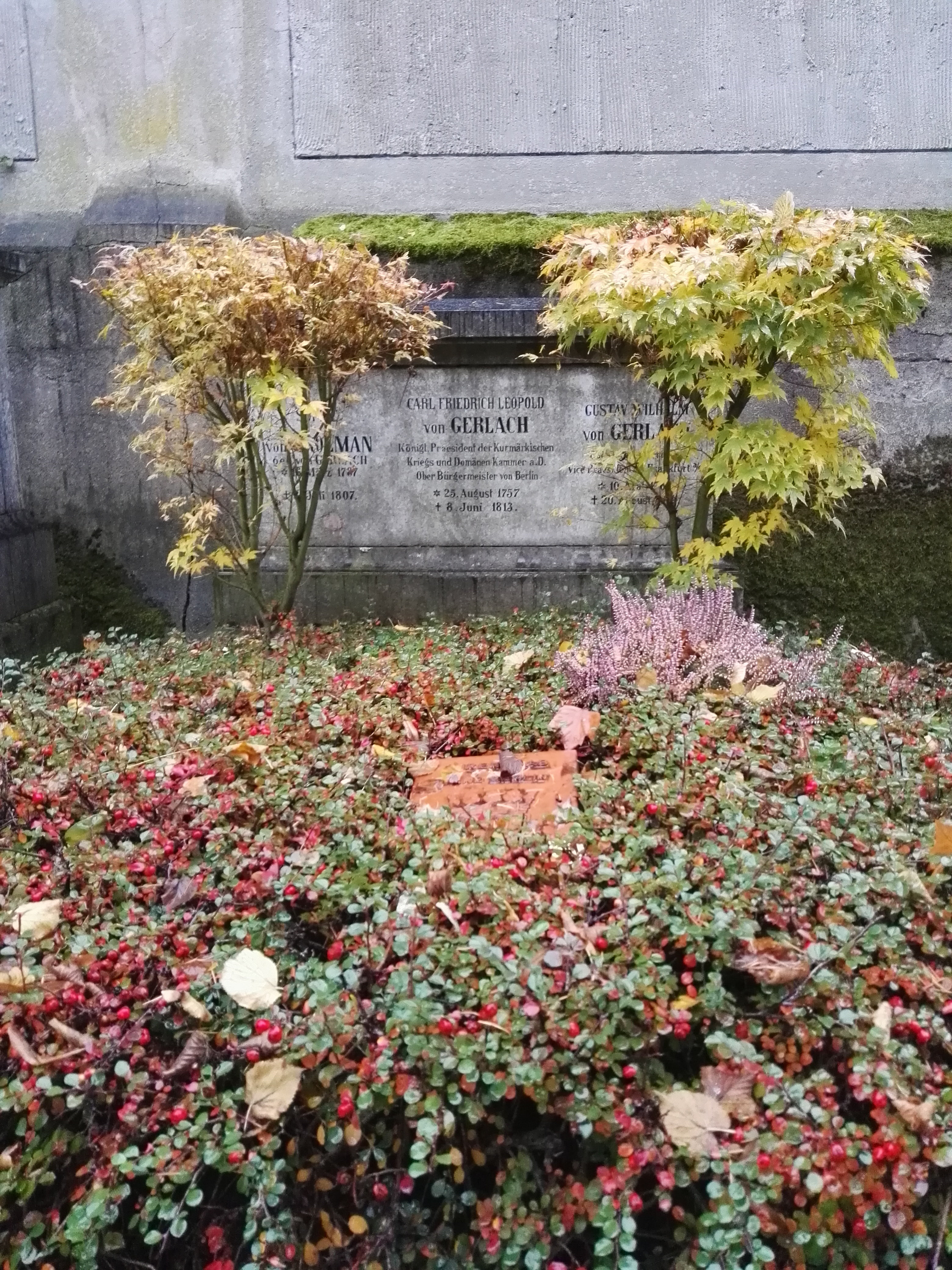 Grab von Carl Friedrich Leopold von Gerlach auf dem Dom-Friedhof II in Berlin-Mitte; Ehrengrab der Stadt Berlin